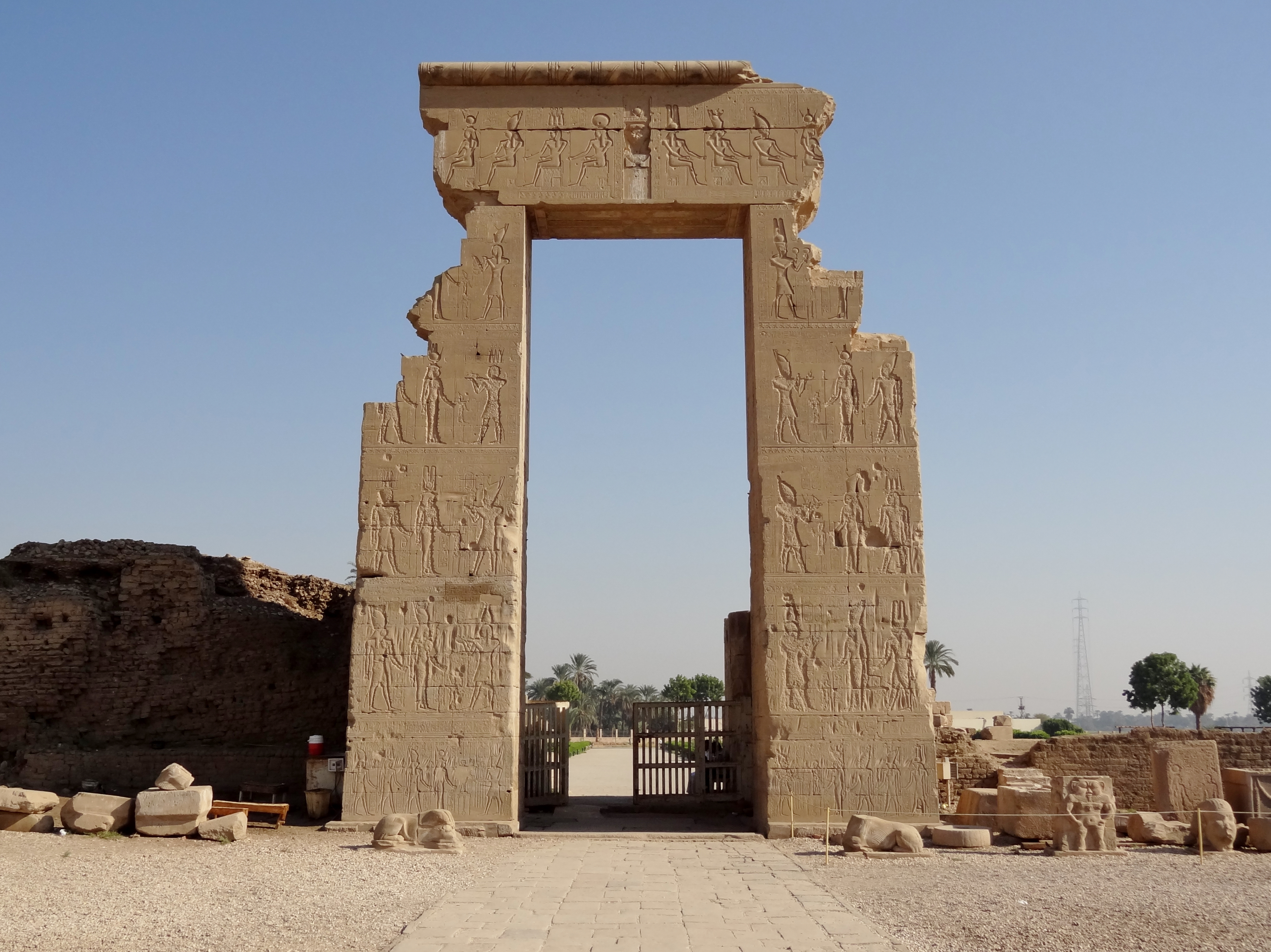 Nordtor oder „Tor des Trajan“ des Hathor-Tempels von Dendera, Ägypten